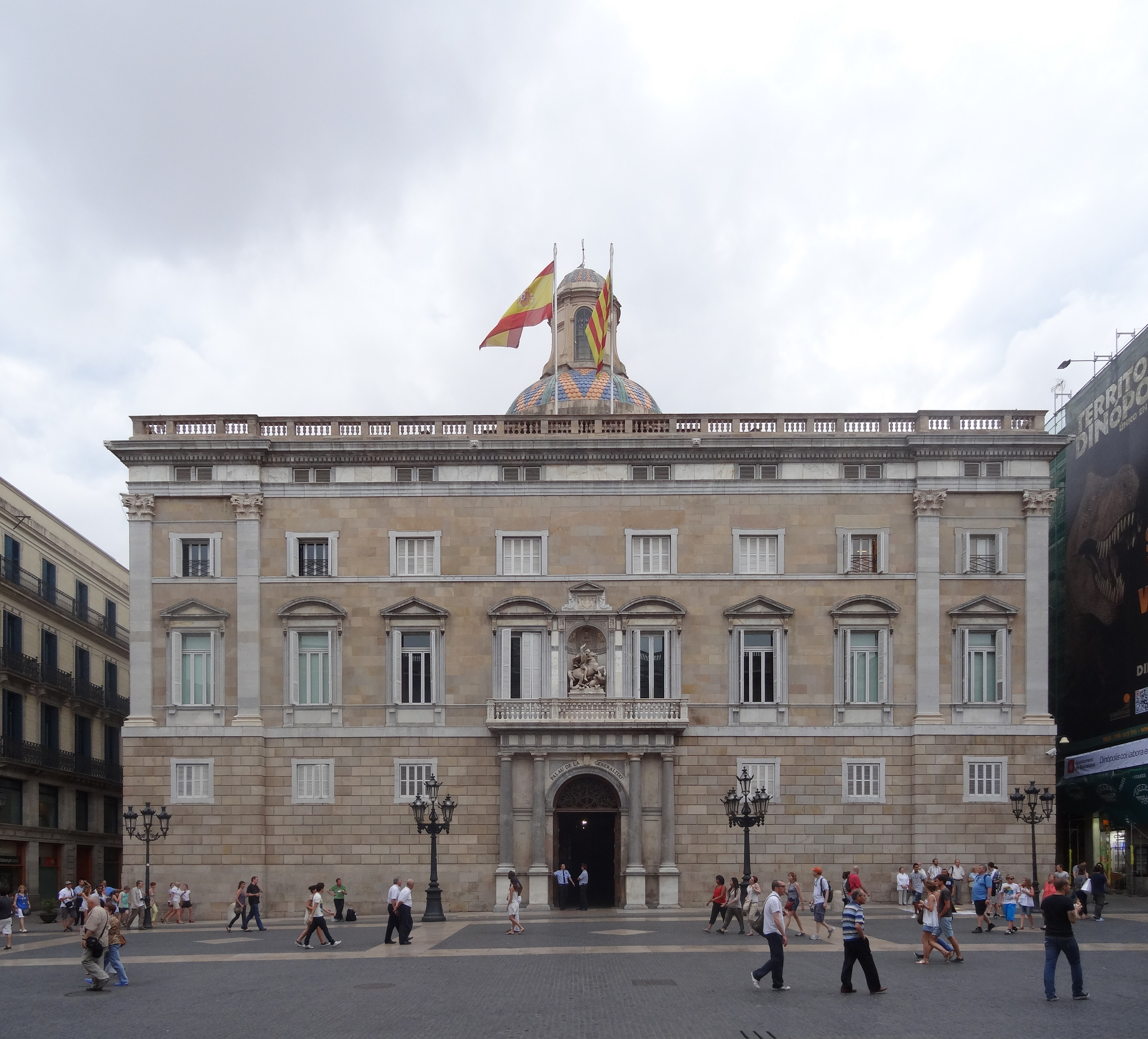 Main facade of Palau de la Generalitat de Catalunya